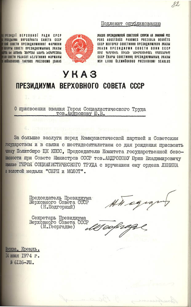 Андропов Юрий Владимирович, Герой Социалистического Труда